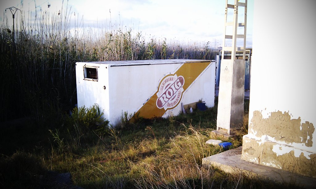 Taken with picplz at Grau Vell in Sagunto, Spain .